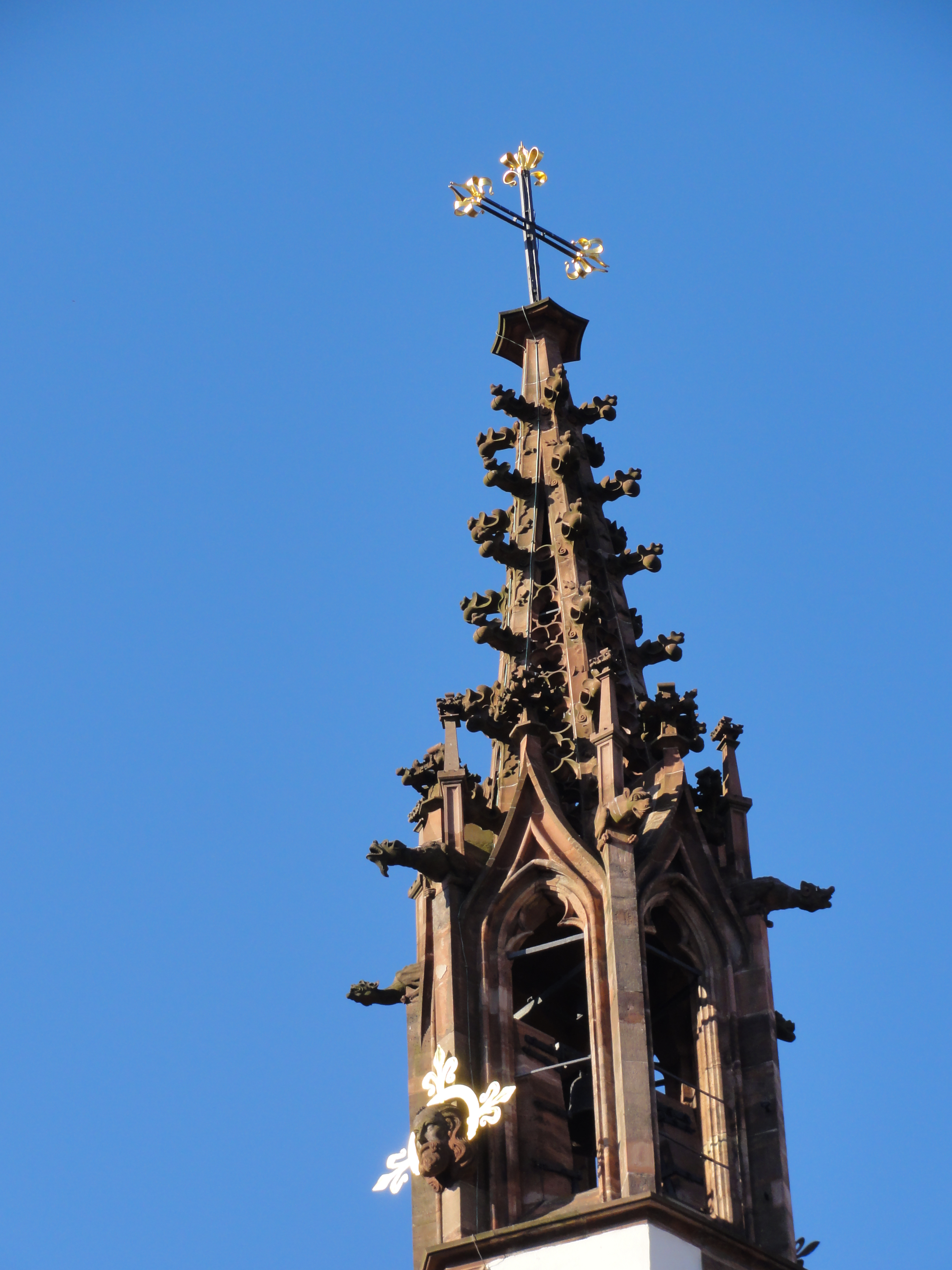 Basel — Altkatholische Predigerkirche, Neugotisches Türmchen